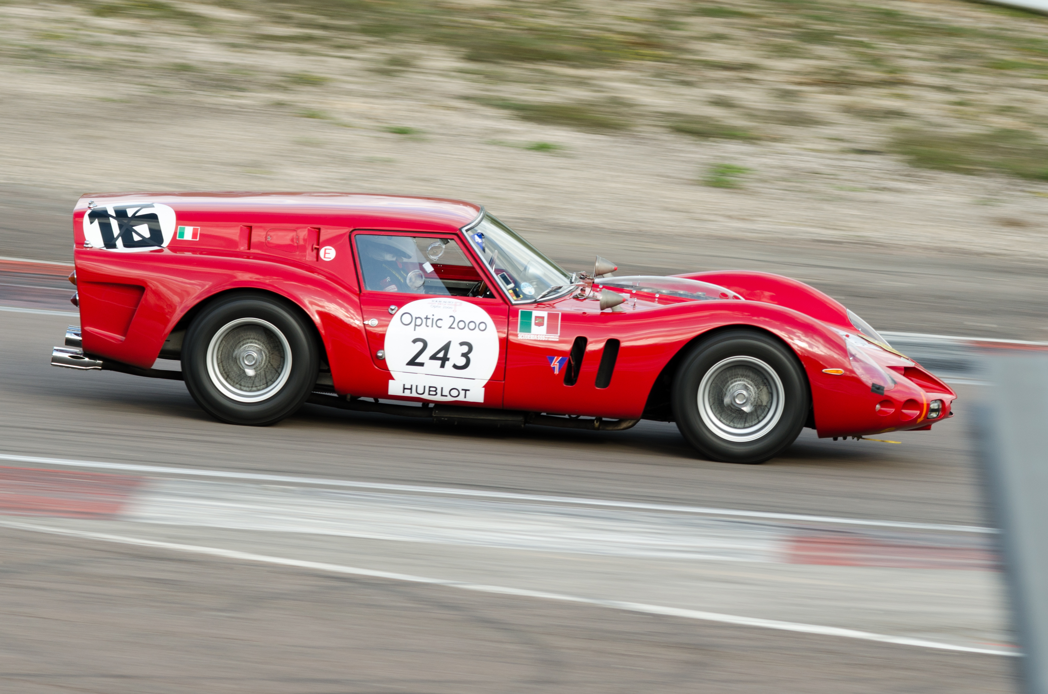 Ferrari Breadvan, Tour Auto 2014, étape sur le Circuit de Prenois.